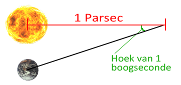 Schematische voorstelling van de parsec -- zelf gemaakt Deze afbeelding is door de auteur (Wilinckx) geplaatst onder de GNU FDL.